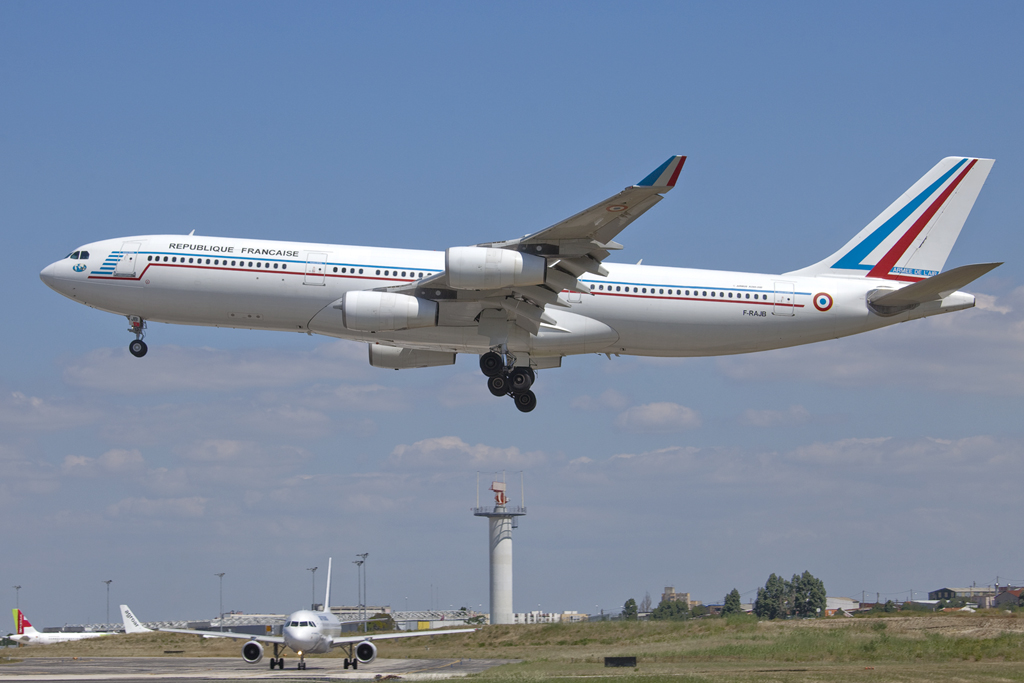 Lisboa